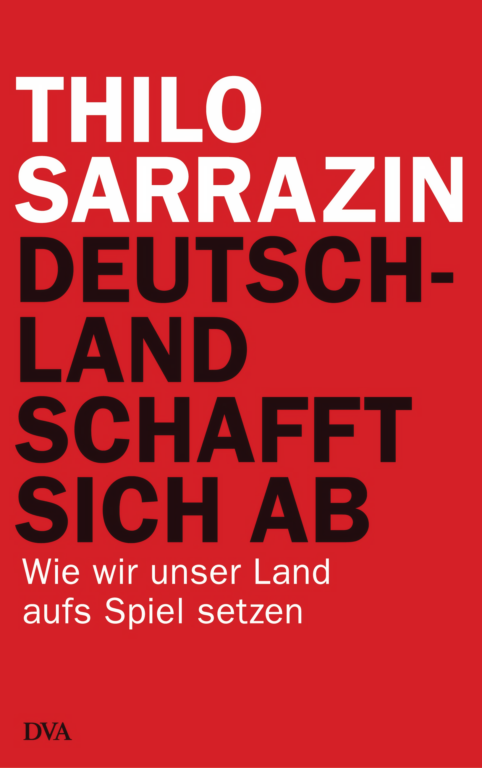 Cover des Buches Deutschland schafft sich ab von Thilo Sarrazin.